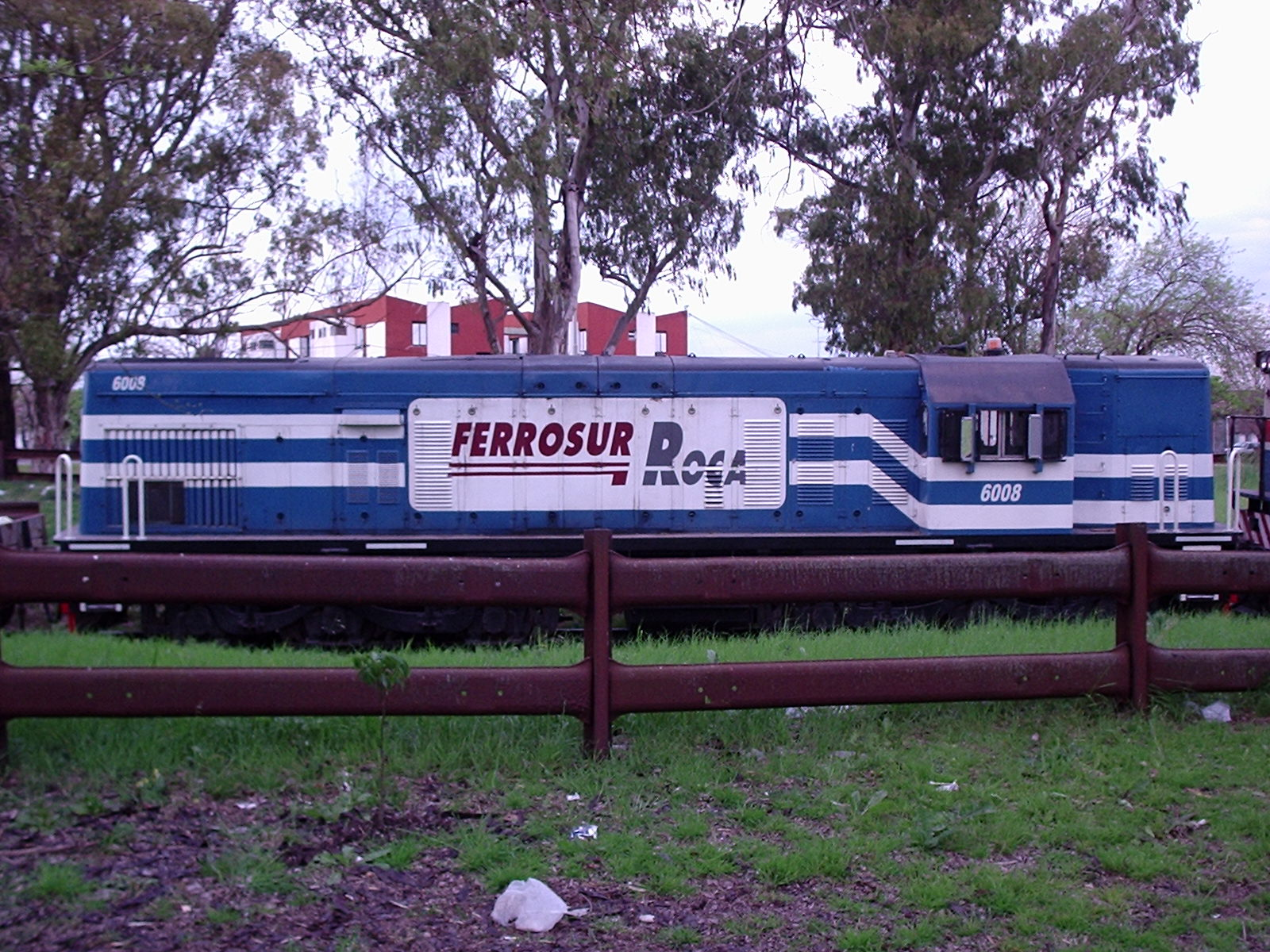 Locomotora General Electric U-13 C 6008 con un reluciente esquema de Ferrosur Roca.